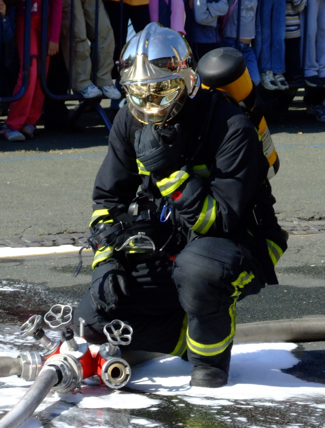 Moderna oprema vatrogasne postrojbe Zagreb